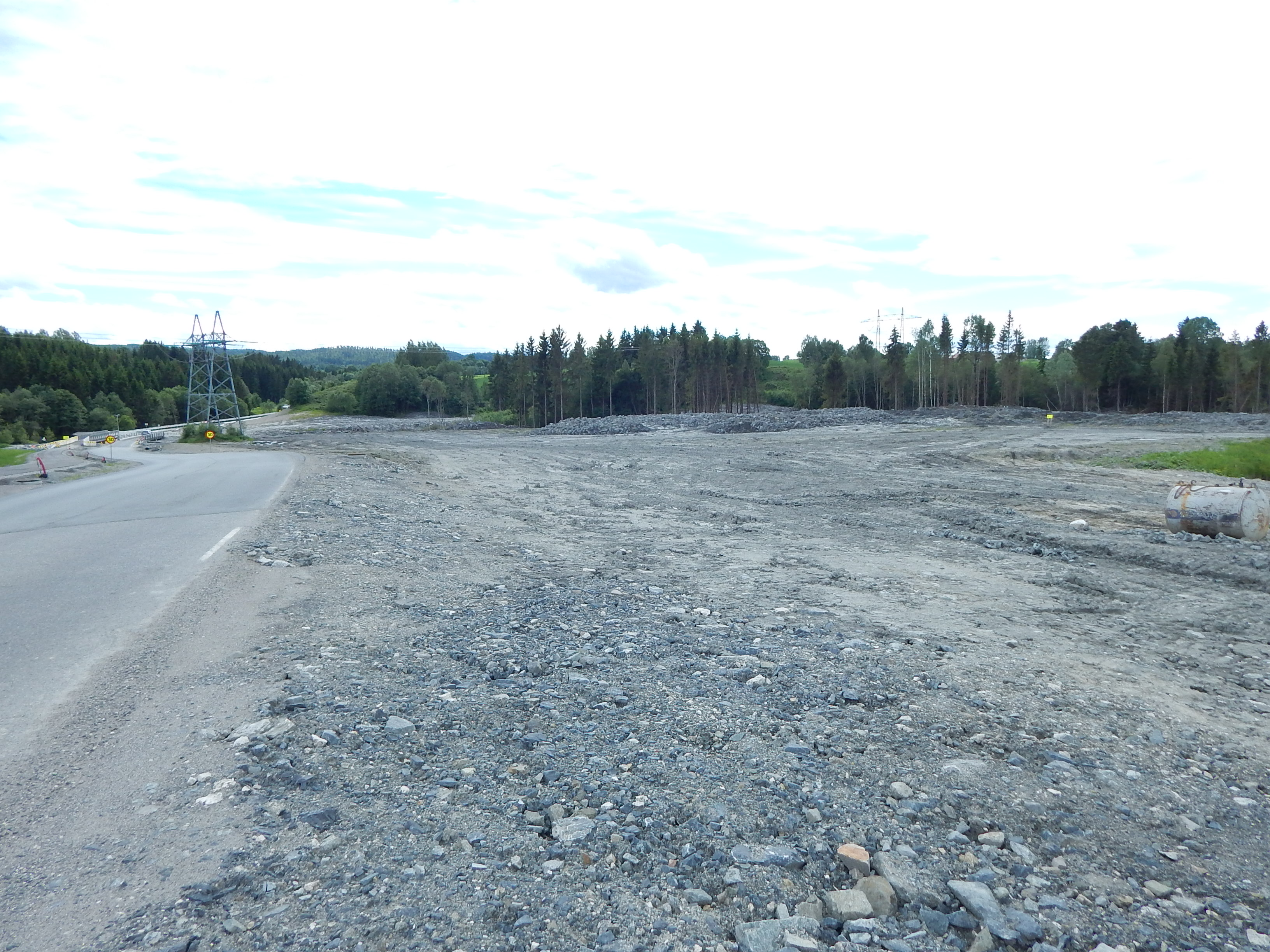 Asakvegen (fylkesvei 256) ved området der det gikk leirras i november 2016